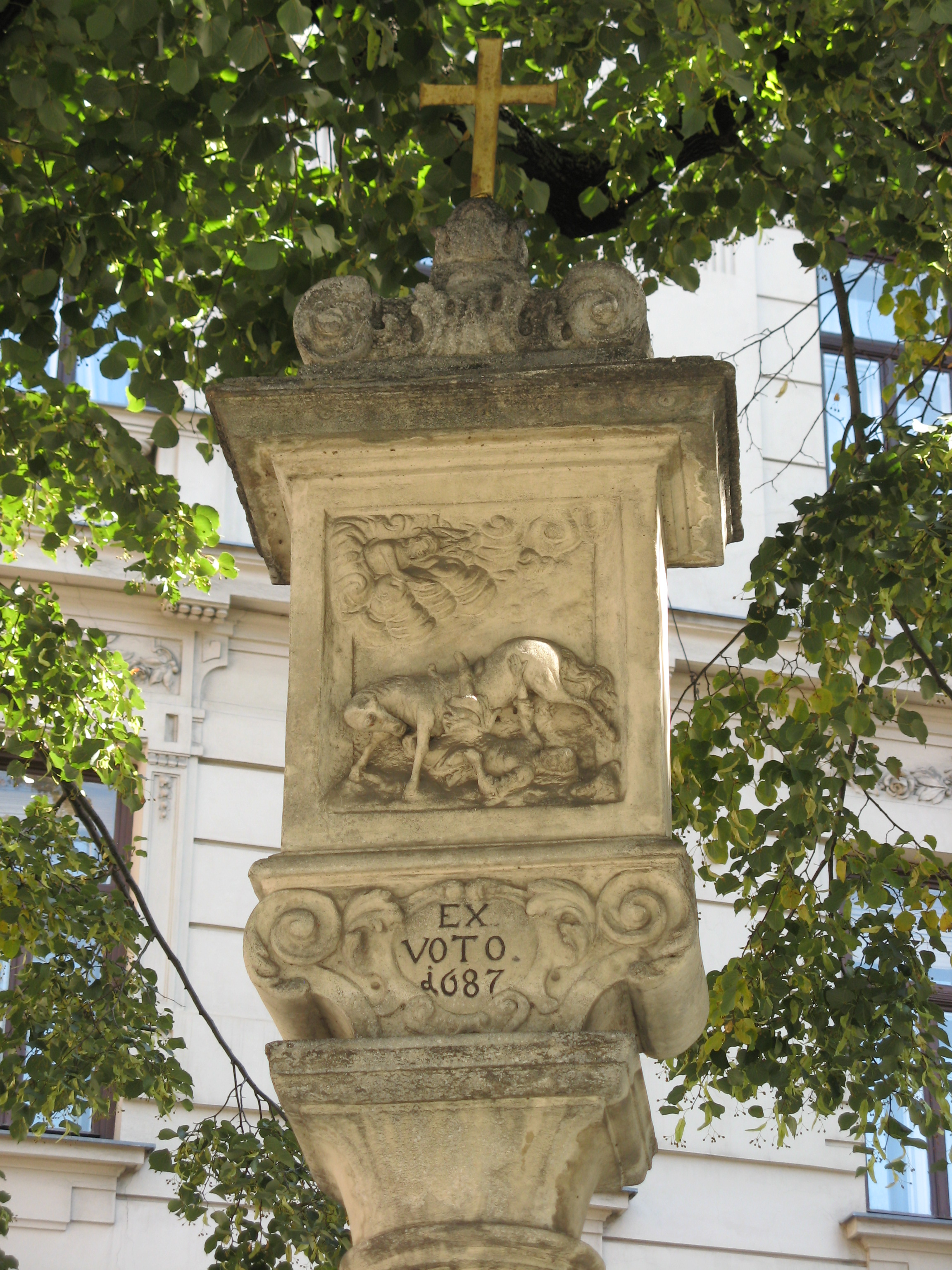 Bekehrung Pauli, Votivsäule (1687), Meidlinger Hauptstraße 3, Wien-Meidling